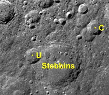 Cráter lunar Stebbins. Cráteres satélite. (Imagen LRO)